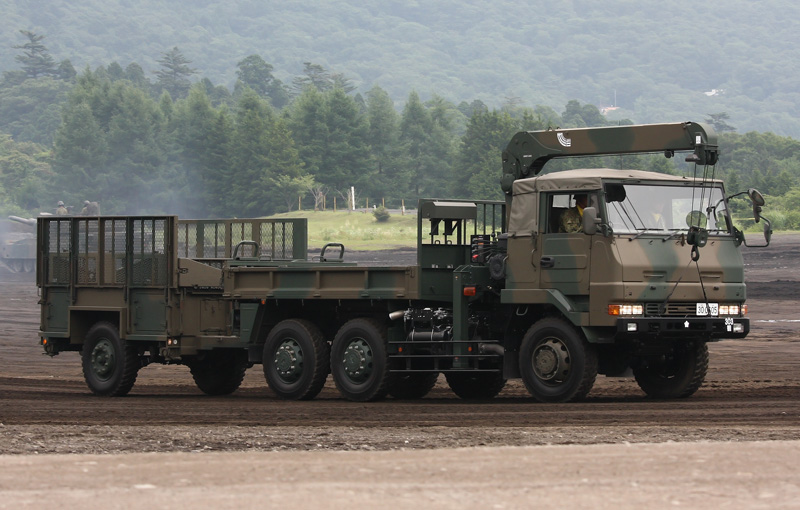 遠隔操縦観測システムの構成車両の機体運搬装置